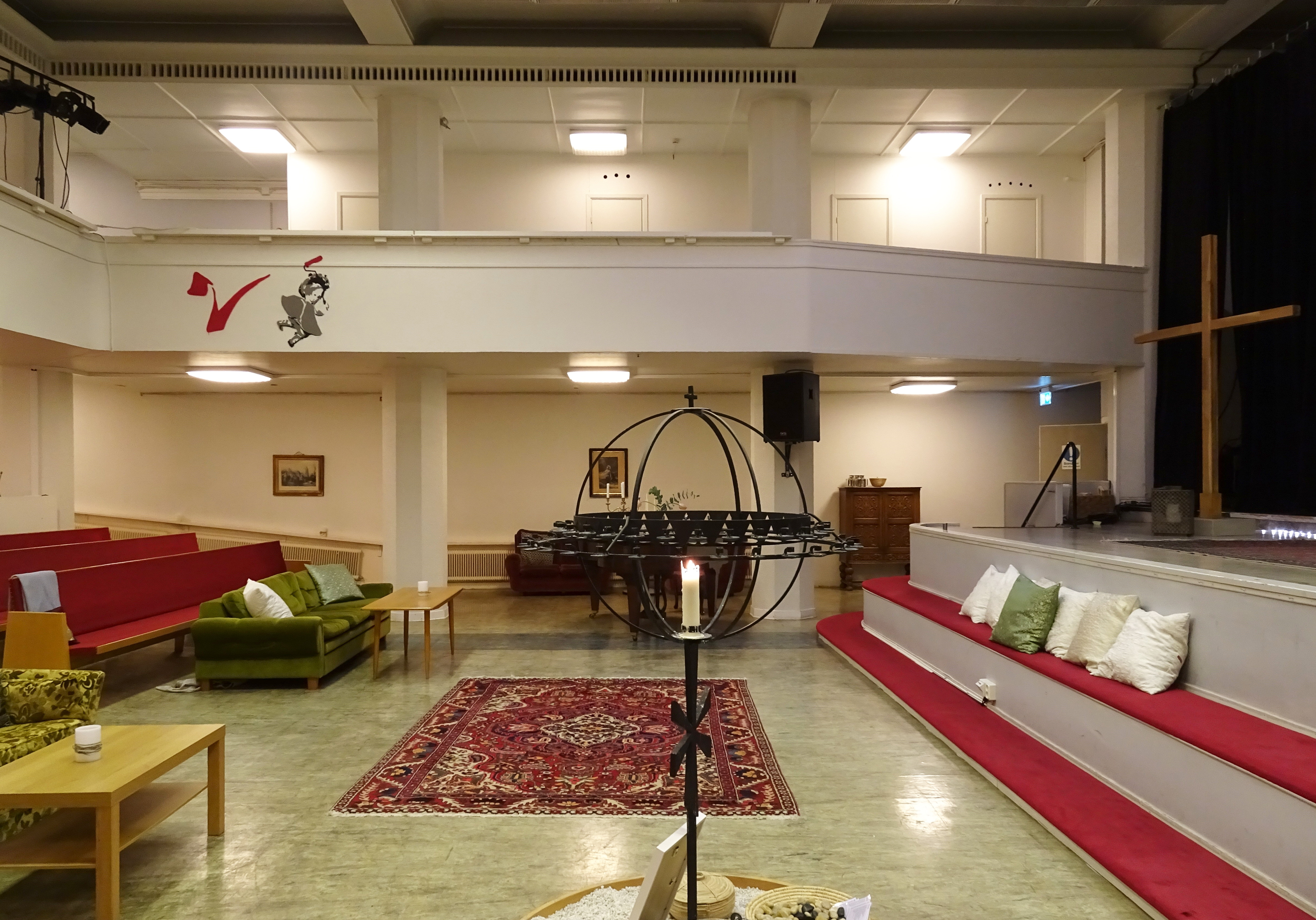 Frälsningsarméns Kår 393, tidigare biograf Ugglan